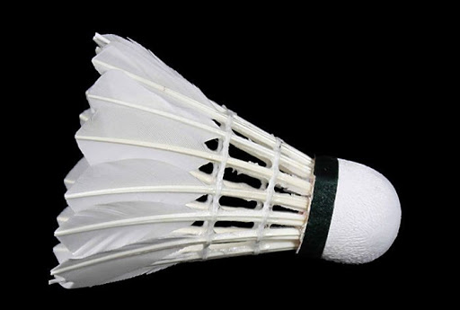 El volante de bádminton puede dividirse en dos partes, como hemos hecho en el diagrama que encontrará a continuación. Estas dos partes son las más importantes de un volante de plumas